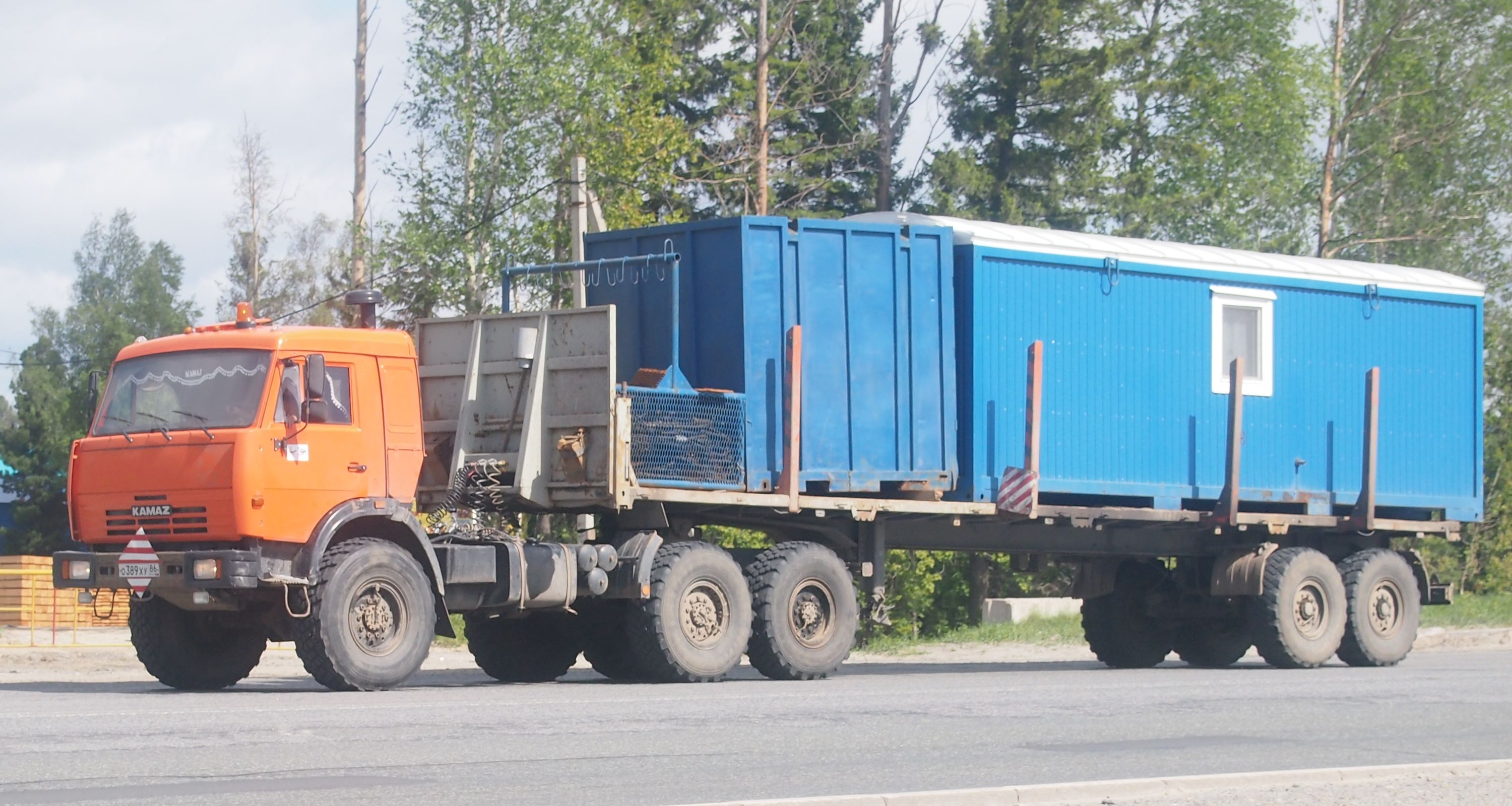 КАМАЗ-44108 Ханты-Мансийск. Трасса Тюмень-Нягань